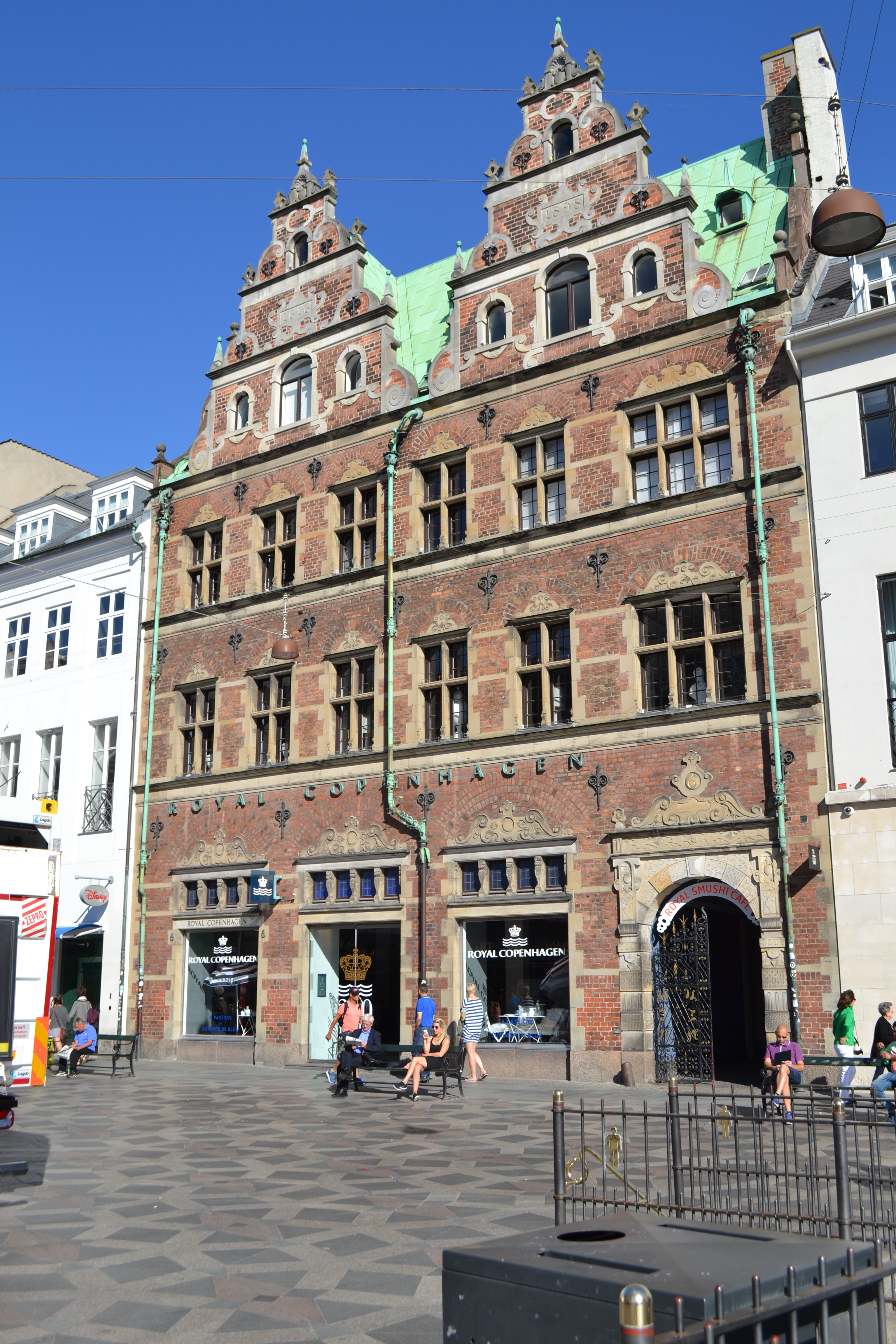 Maison de Mathias Hansen, place Amager, Copenhague, construite en 1616.